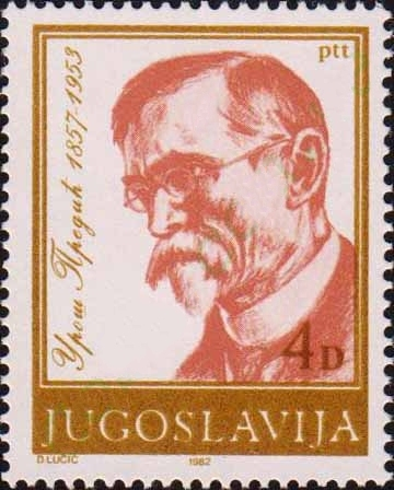 Uroš Predić, self-portrait